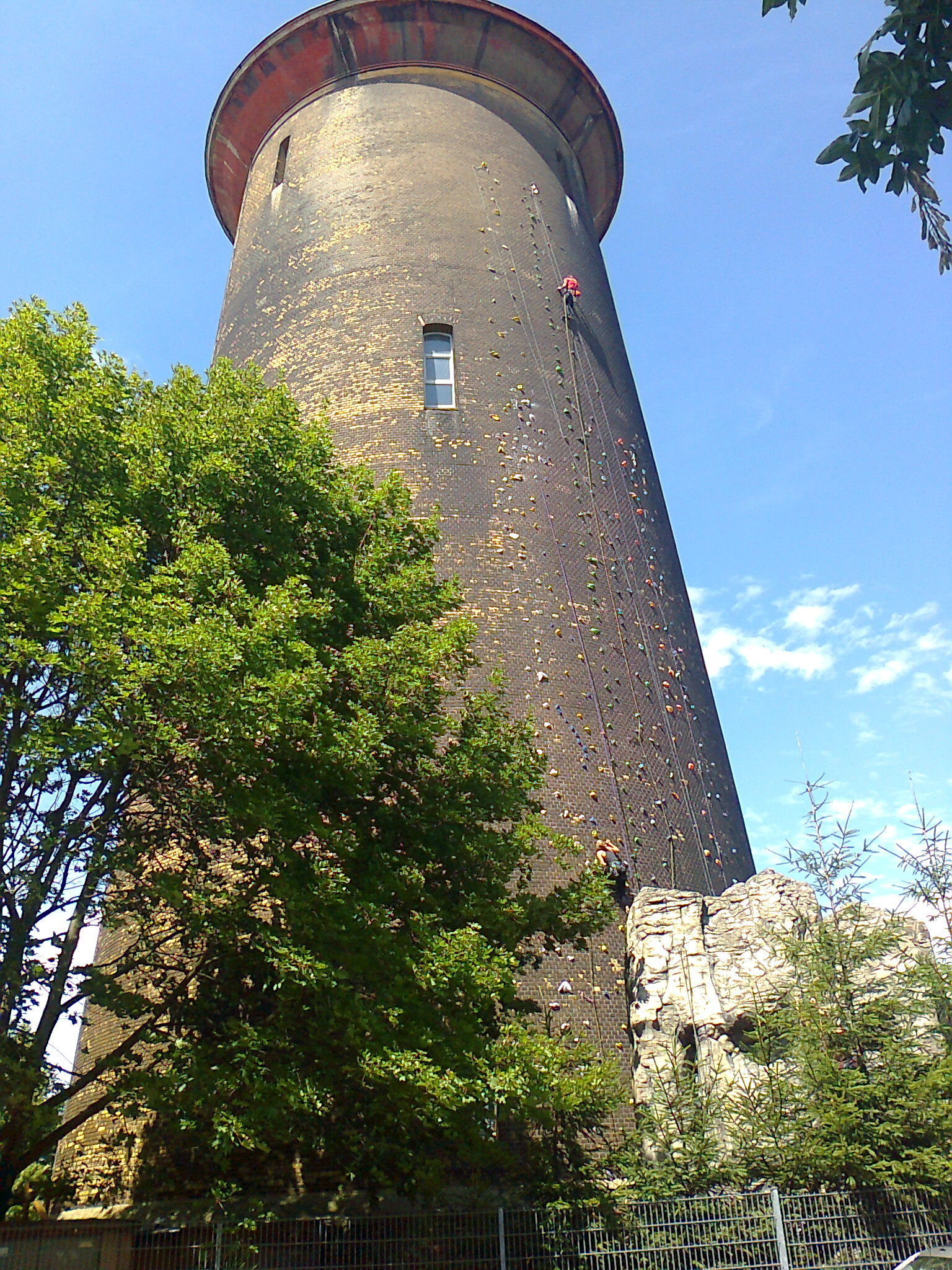 Ehemaliger Wasserturm Mockau wird als Kletterturm genutzt